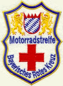 offizielles Logo der Motorradstreife